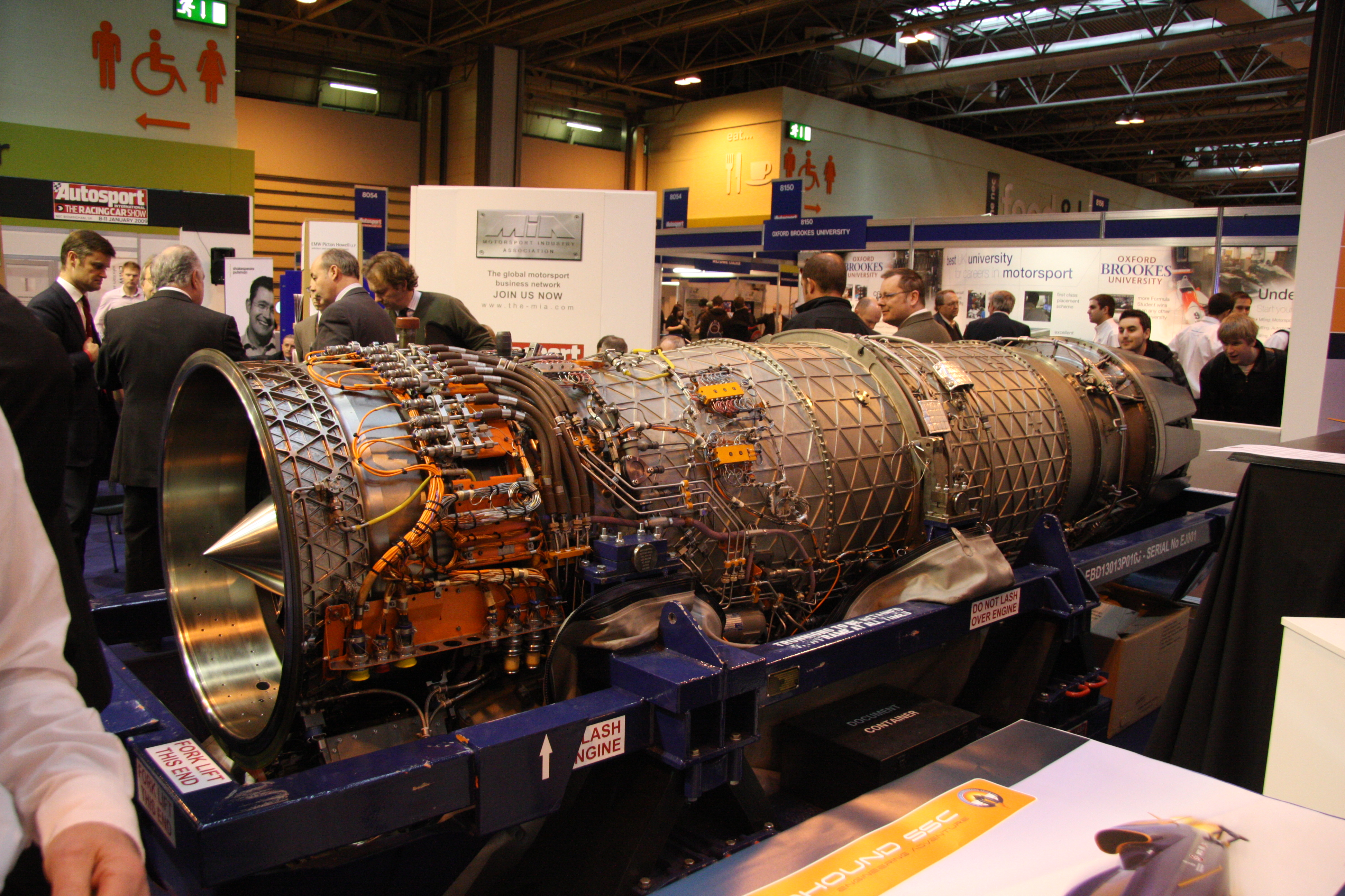 Eurojet EJ200 Typhoon engine